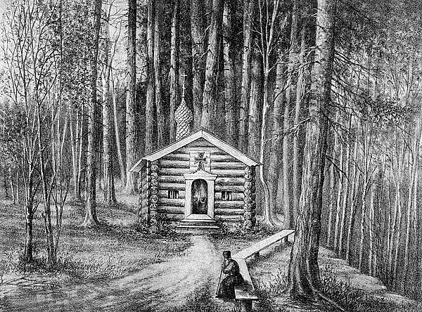 Усыпальница святителя Филиппа (Подпись ошибочна. На литографии изображена келья Филиппа, впоследствии - старая филипповская часовня).